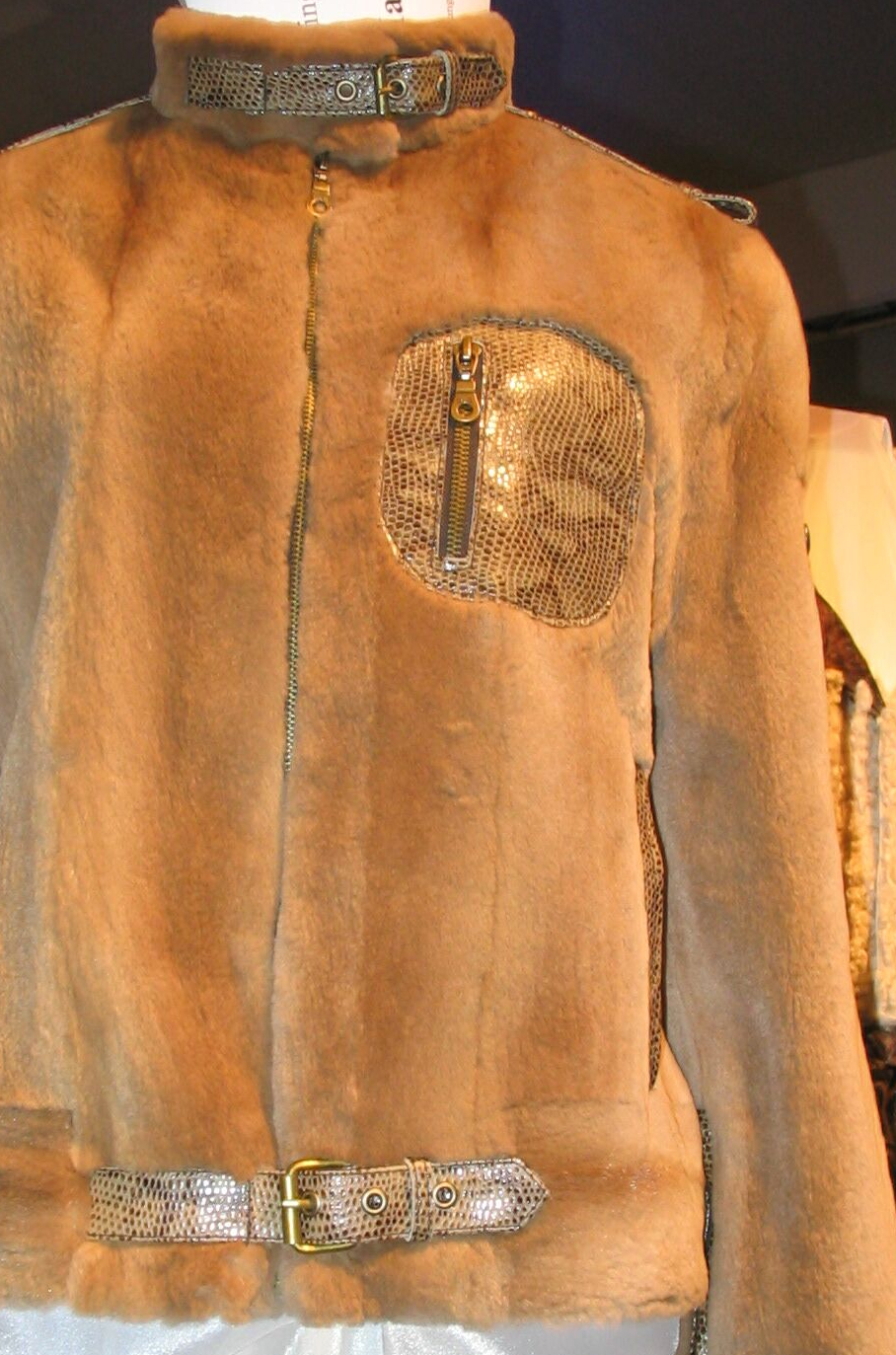 Jacke aus gerupftem Nerz (Samtnerz). Entwurf und Ausführung Andreas Fahnenstich, Recklinghausen. Leistungswettbewerb des Kürschnerhandwerks, anlässlich der Pelzmesse in Frankfurt/Main, 2008